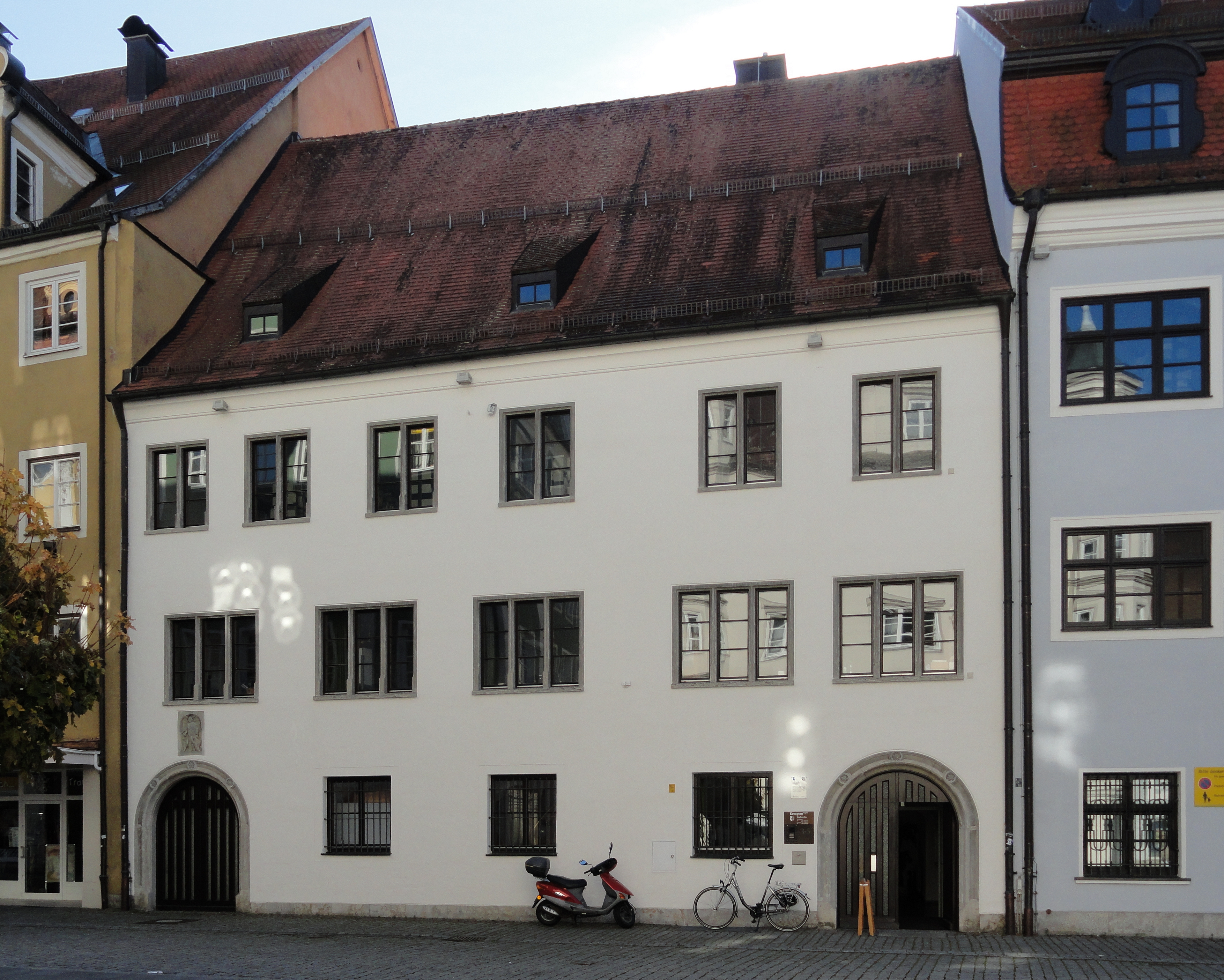 Altes Zollamt in Kempten